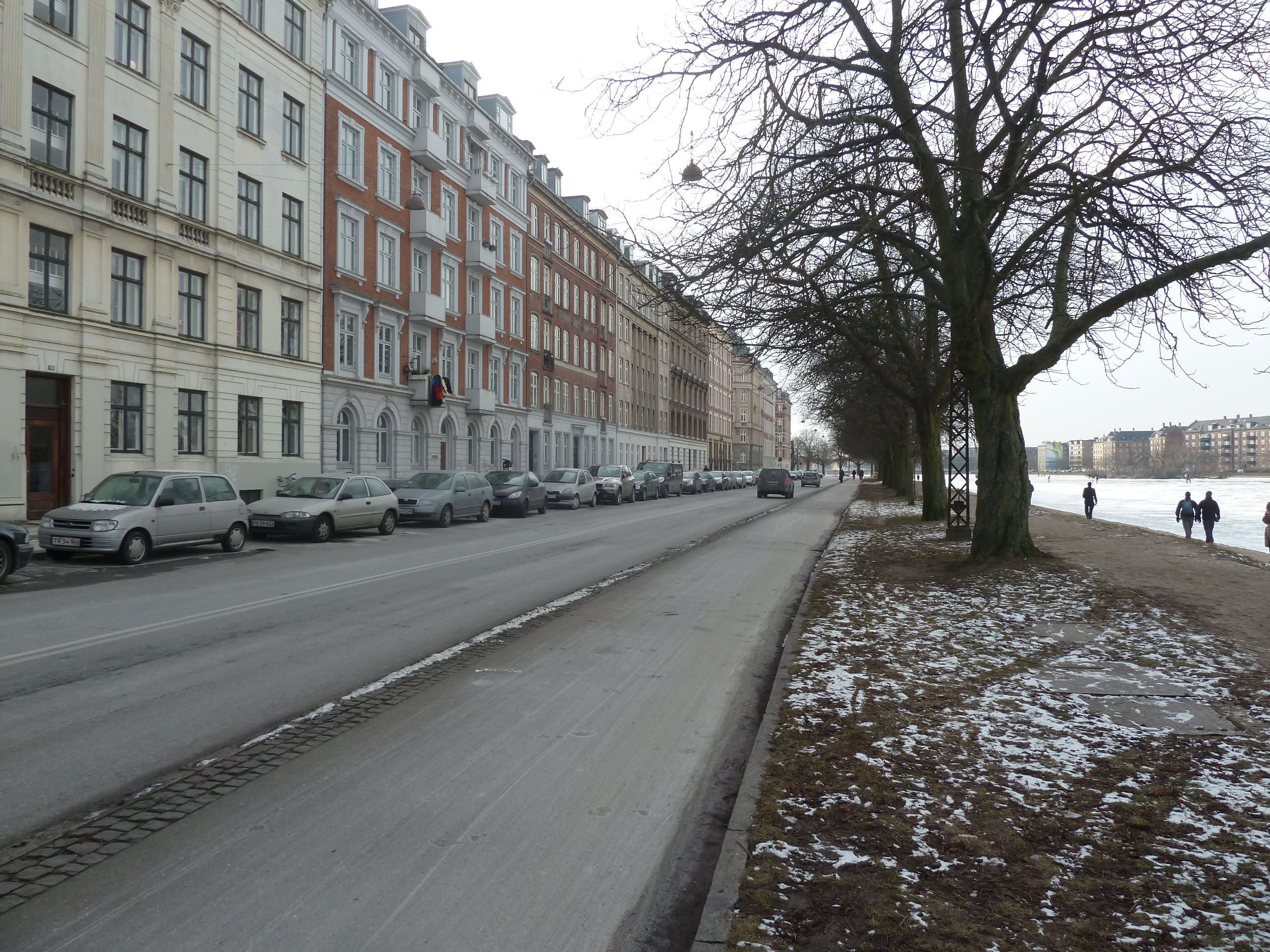 The street Øster Søgade in Østerbro in Copenhagen.